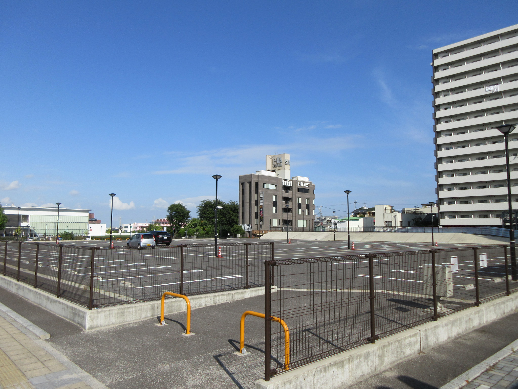 セルビ跡地にできた「りぶら東駐車場2」。岡崎市康生通西。